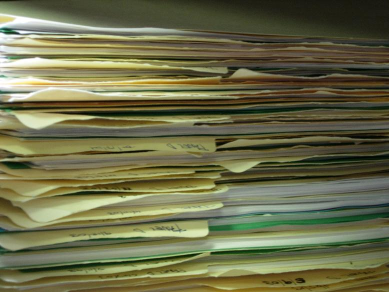 Paperwork